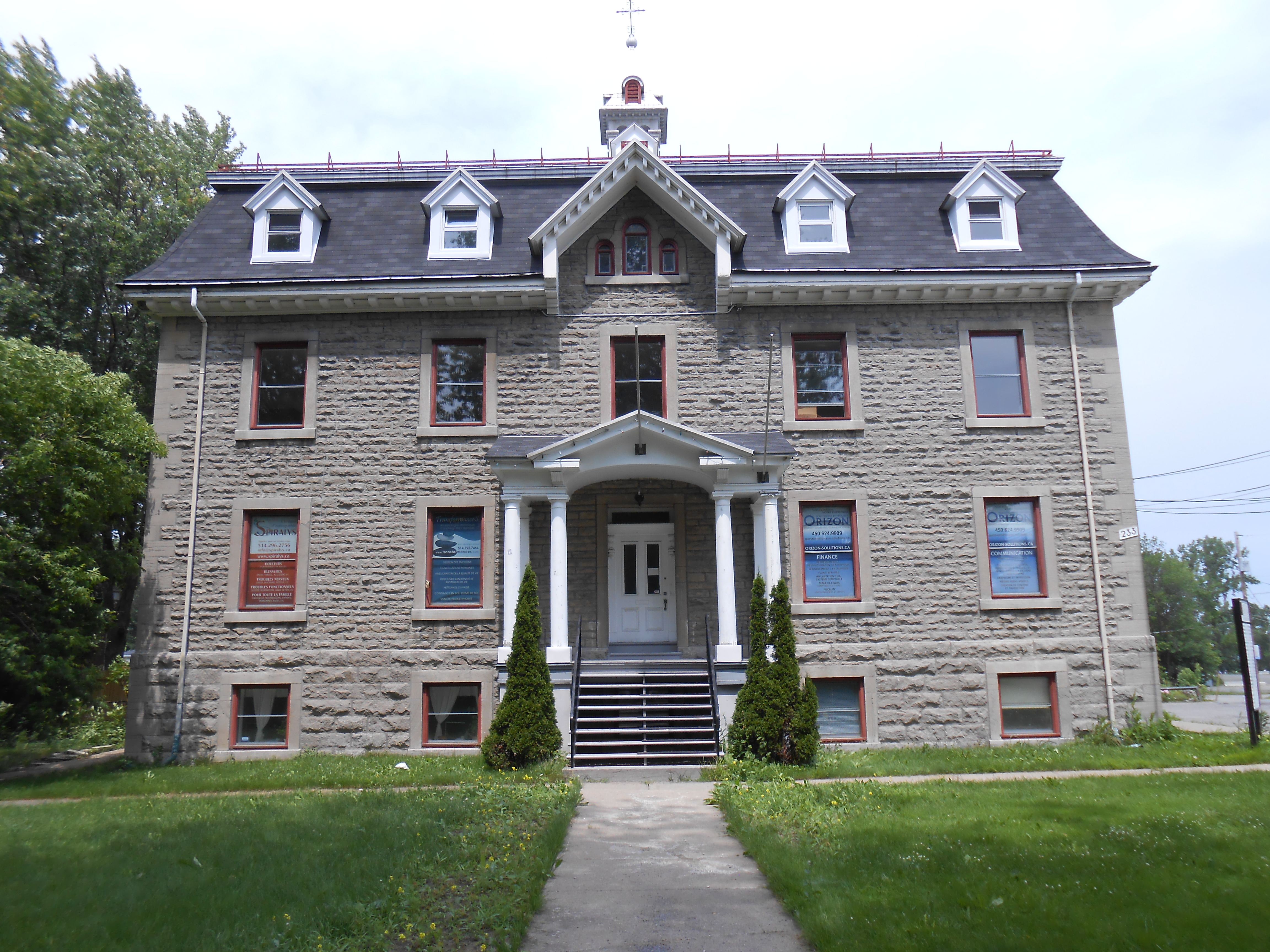 Ancien couvent des Soeurs de Sainte-Croix, 233, boulevard Sainte-Rose, Laval